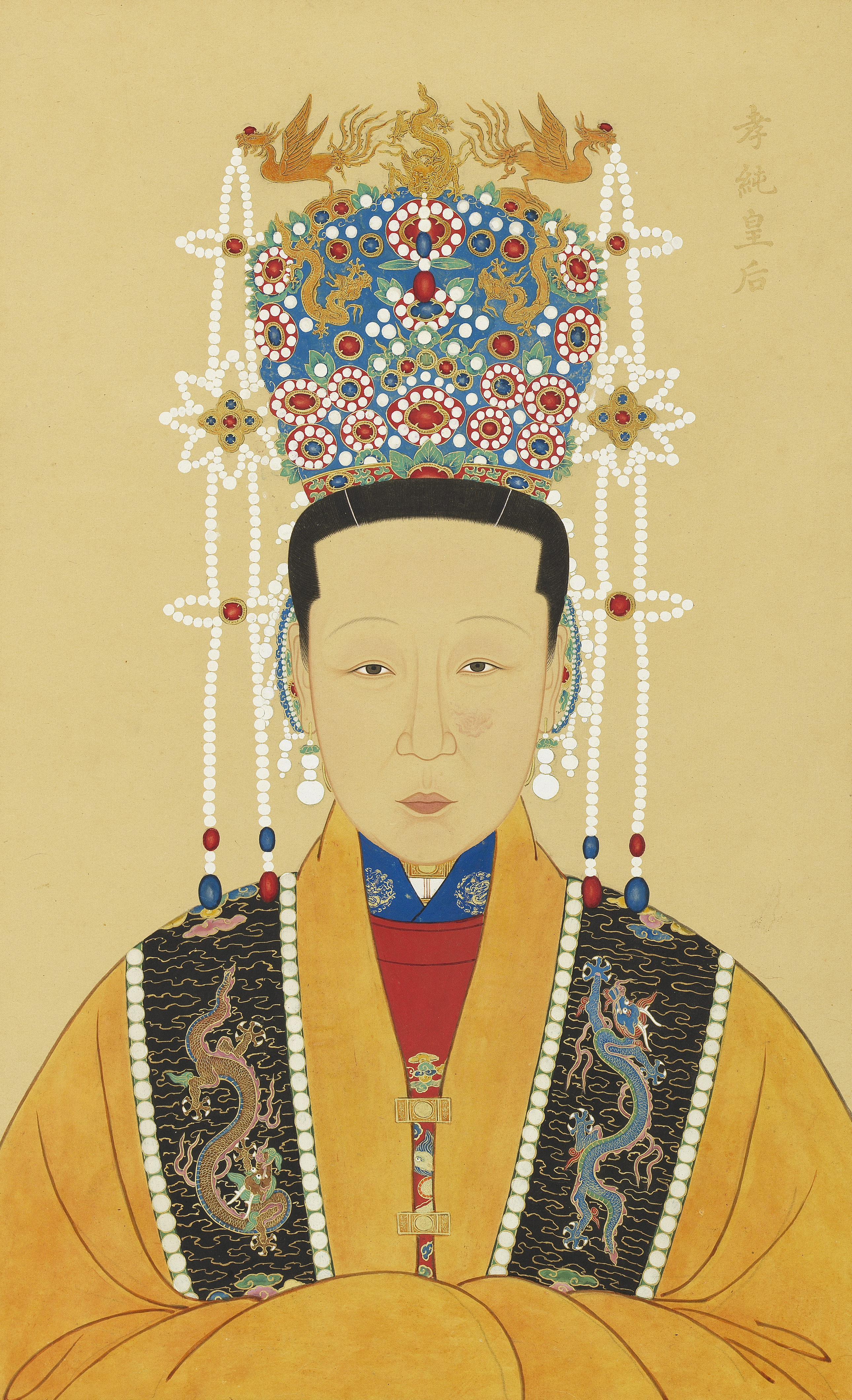 明代帝后半身像（二） 冊 孝和皇后；孝純皇后